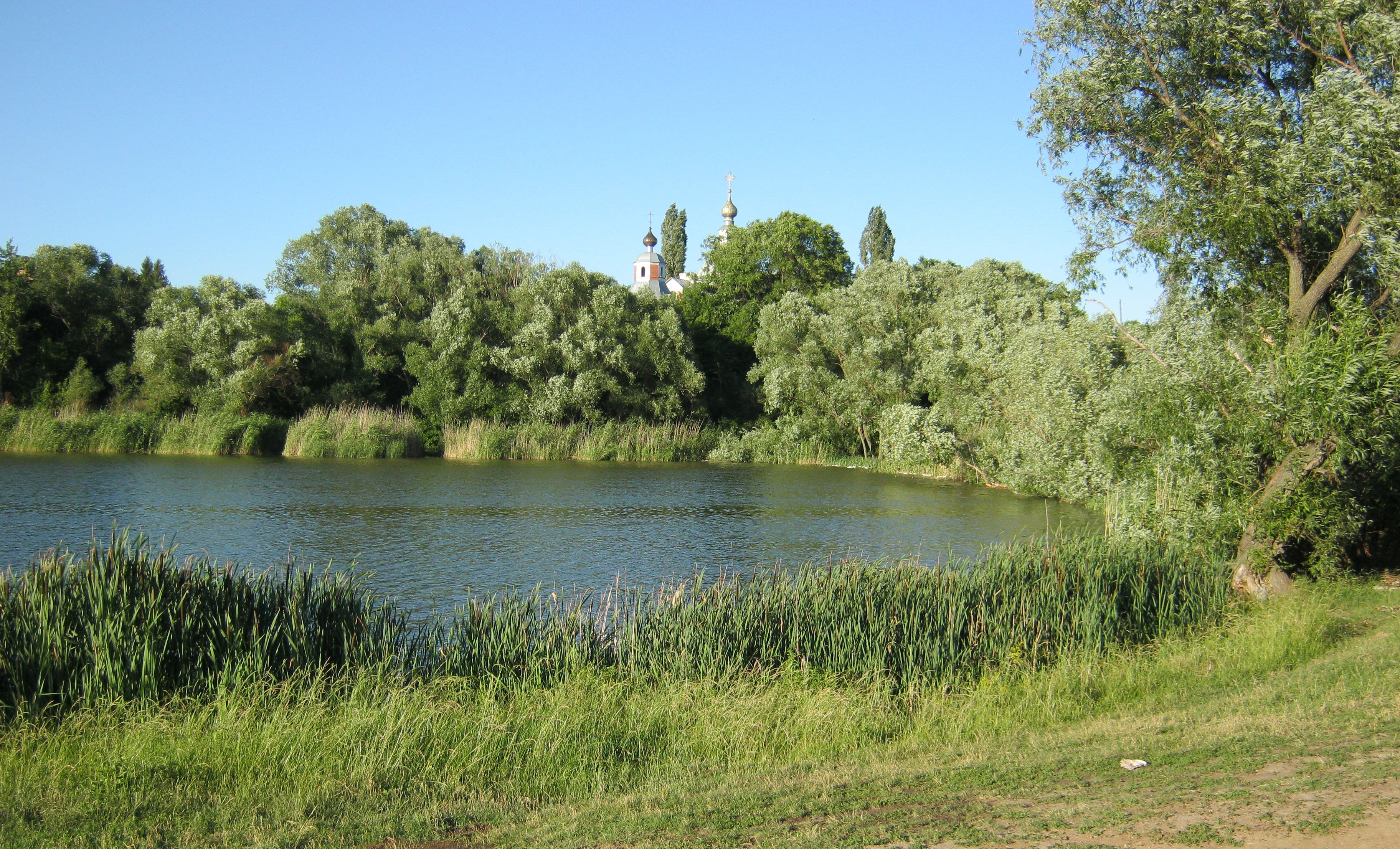 п.Латная. Пруд